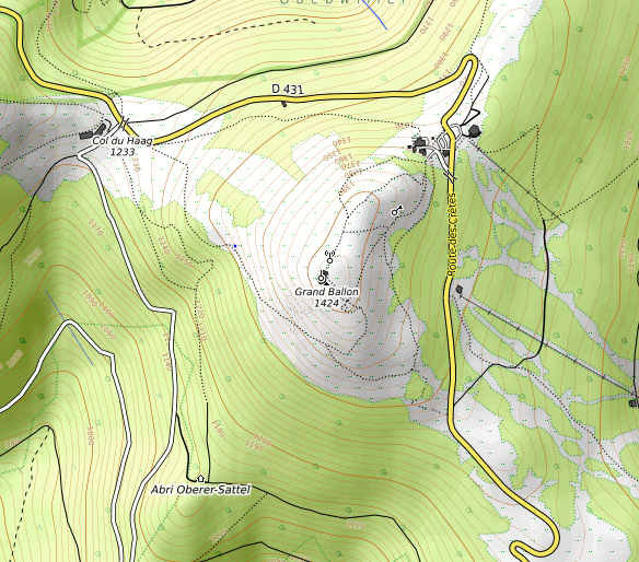 carte réalisée sur umap This map may be incomplete, and may contain errors. Don't rely solely on it for navigation.